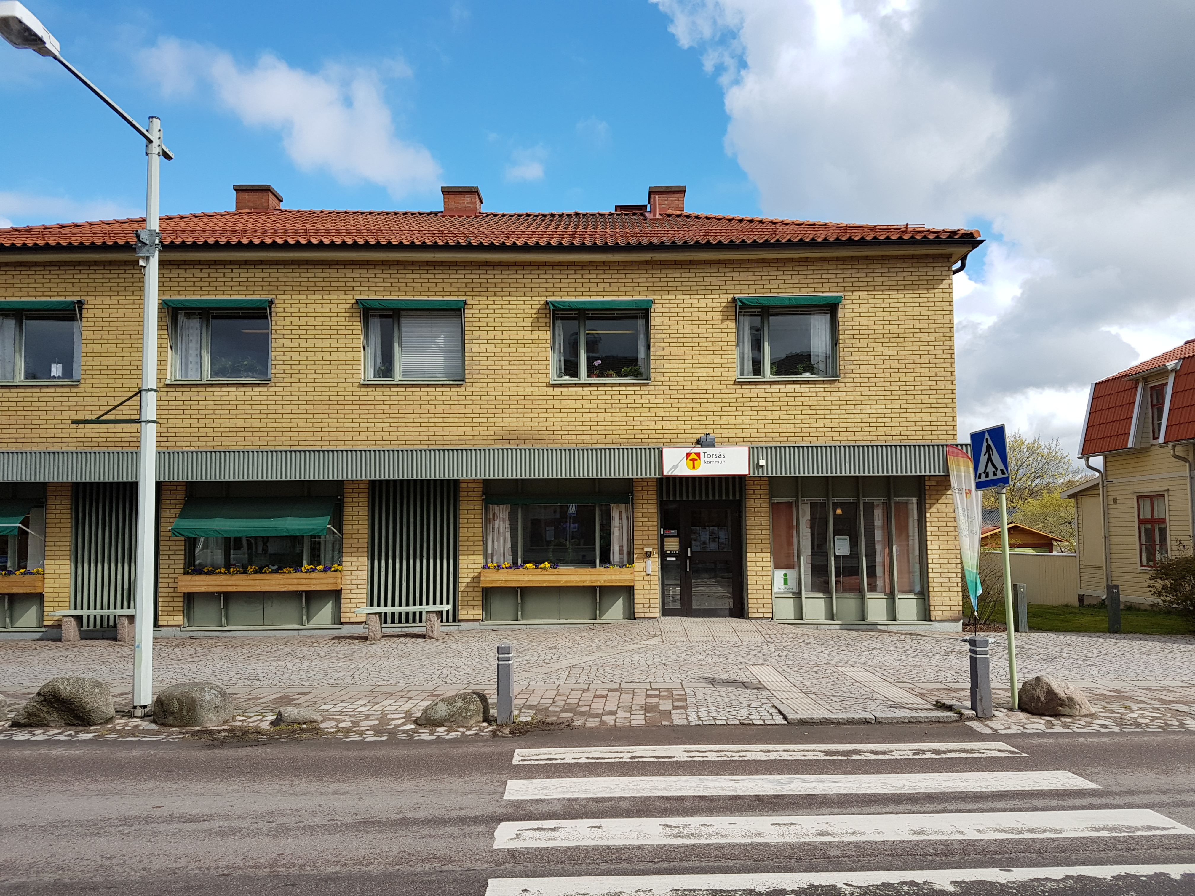 Torsås kommunhus